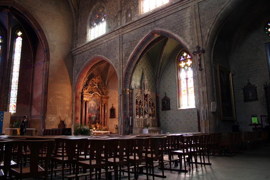 Mirande, Gers, France (church sainte-Marie)